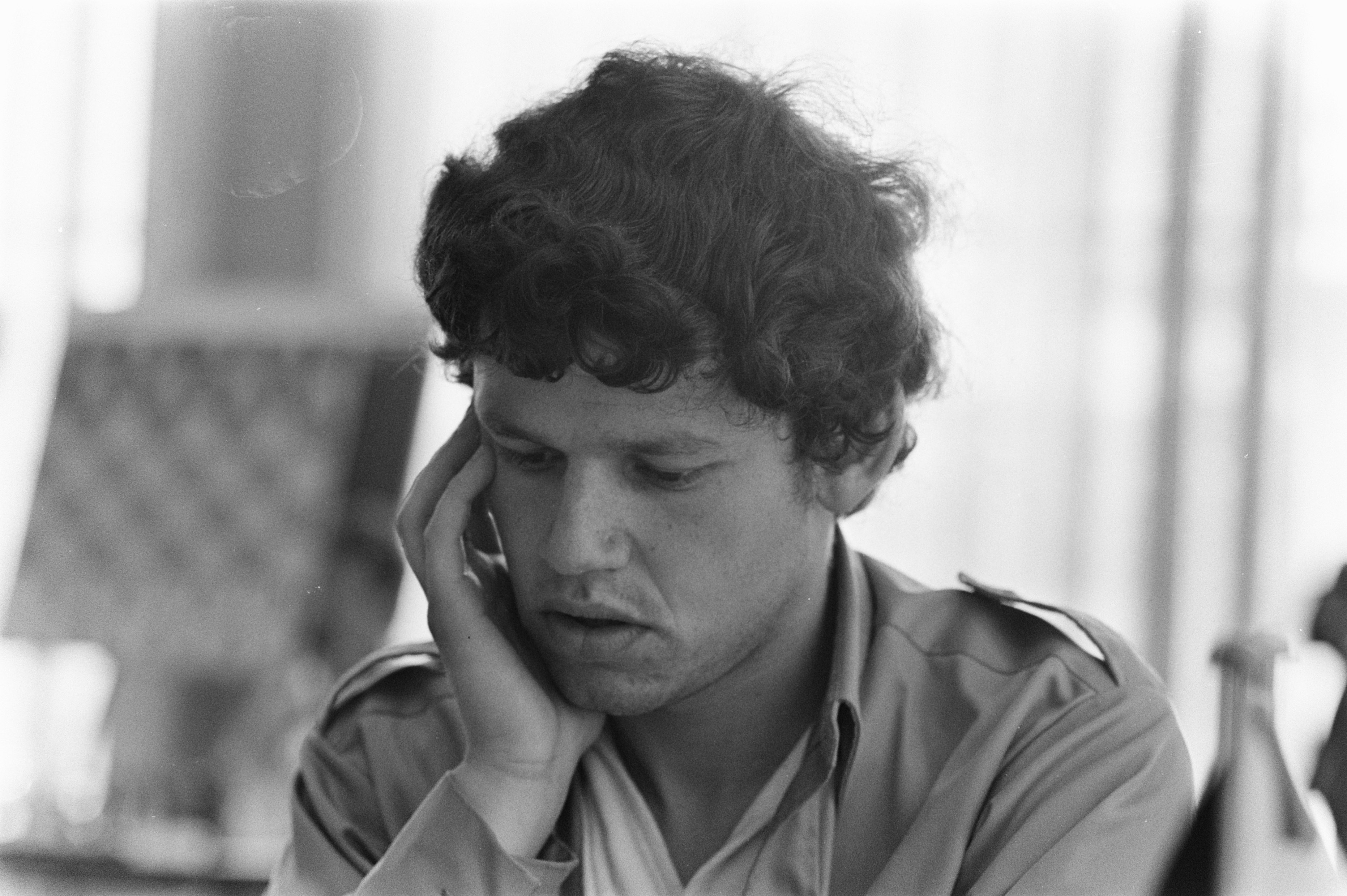 Collectie / Archief : Fotocollectie Anefo Reportage / Serie : [ onbekend ] Beschrijving : IBM-schaaktoernooi; Scholl Datum : 30 juli 1970 Trefwoorden : schaken Instellingsnaam : IBM-Schaaktoernooi Fotograaf : Evers, Joost / Anefo Auteursrechthebbende : Nationaal Archief Materiaalsoort : Negatief (zwart/wit) Nummer archiefinventaris : bekijk toegang 2.24.01.05 Bestanddeelnummer : 923-7140